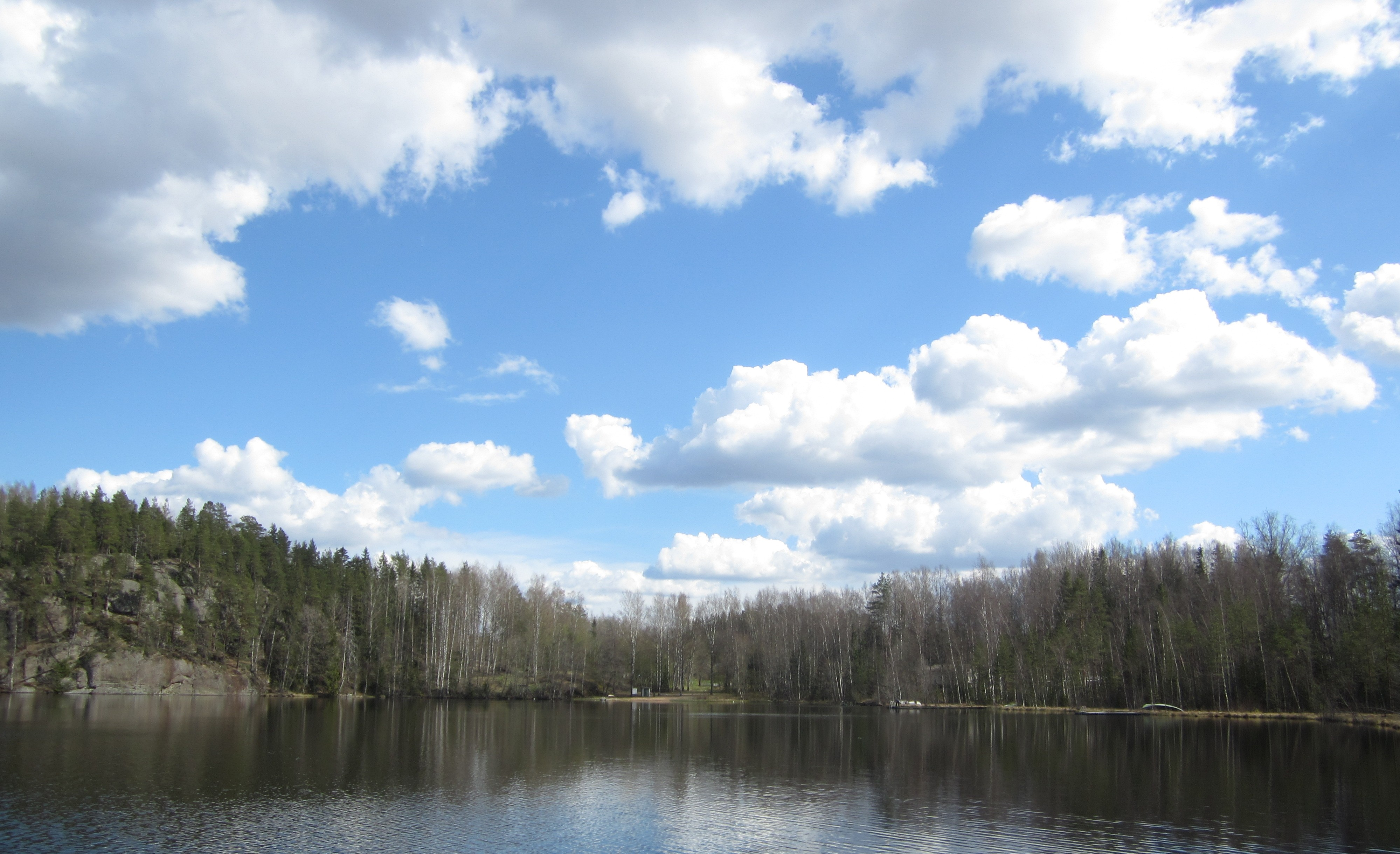 Ikkalan Kotojärvi